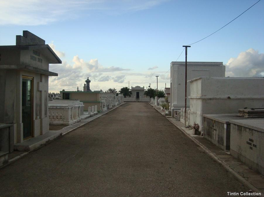 Cementerio-Pasillo-Central